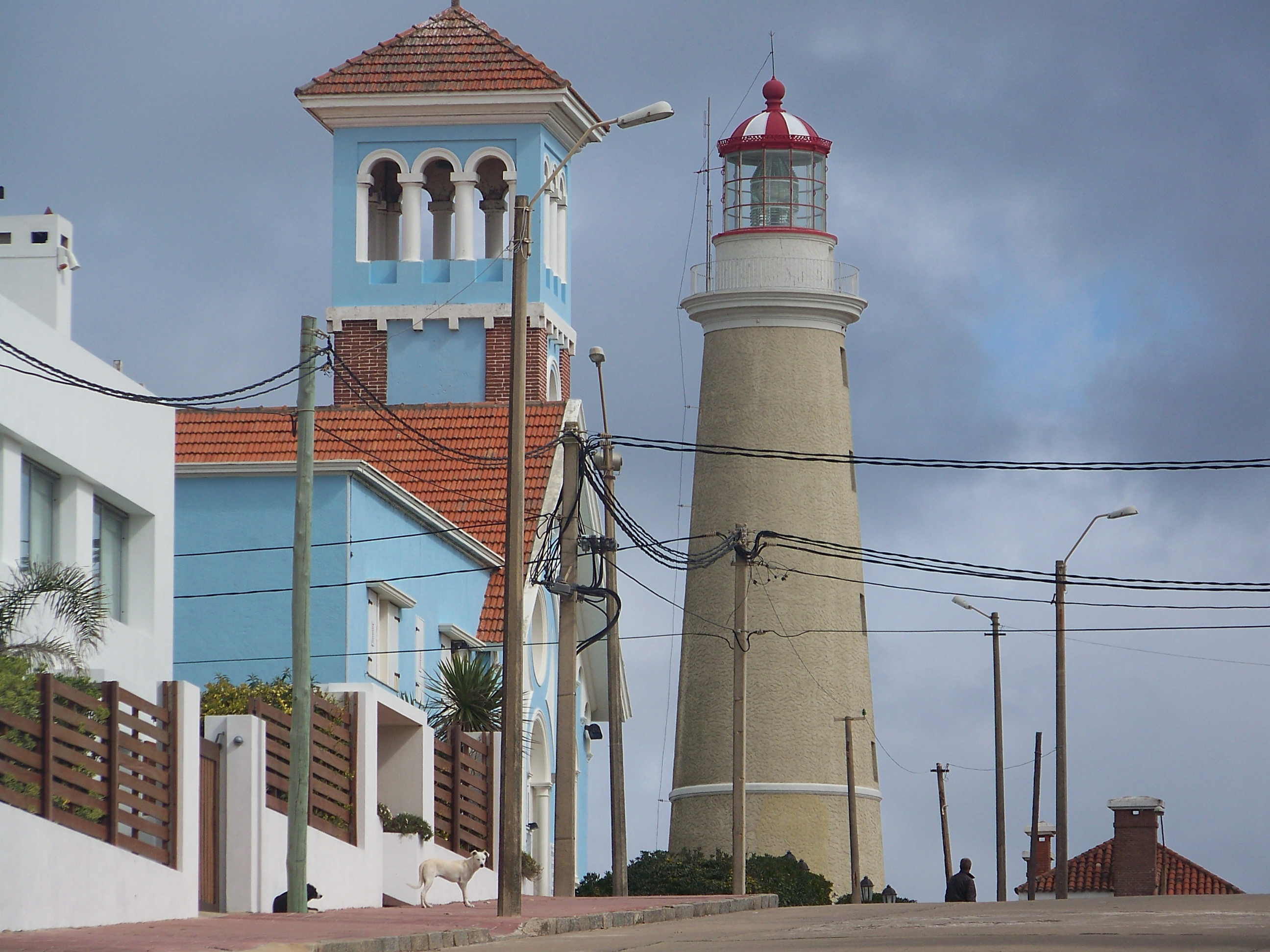 Faro de Punta del Este. Ubicada en el departamento de Maldonado